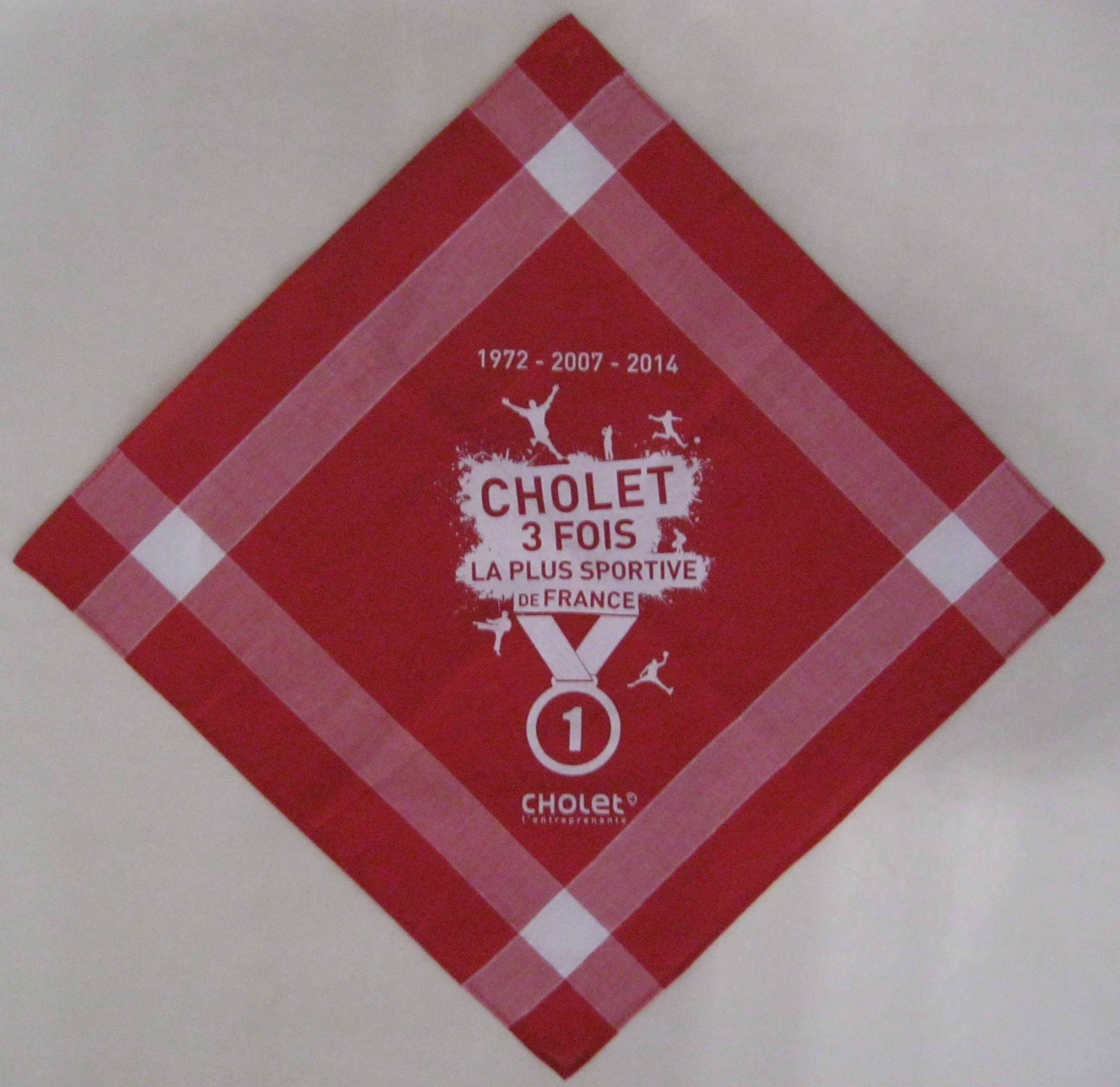 Promotion et reconnaissance du sport à Cholet